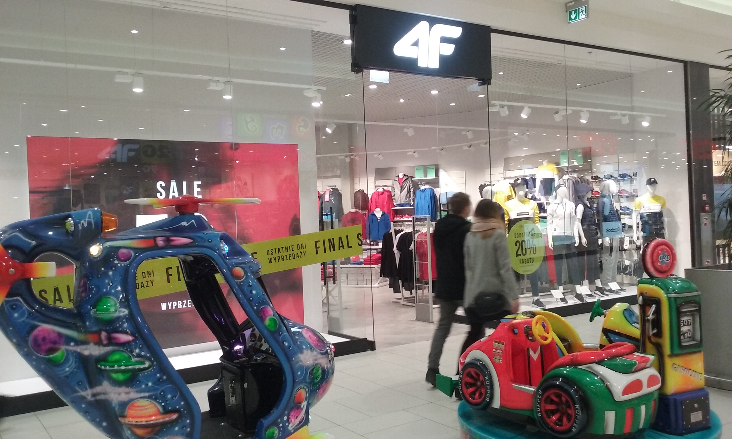 Salon 4F w 60-tysięcznym Tomaszowie Mazowieckim, województwo łódzkie